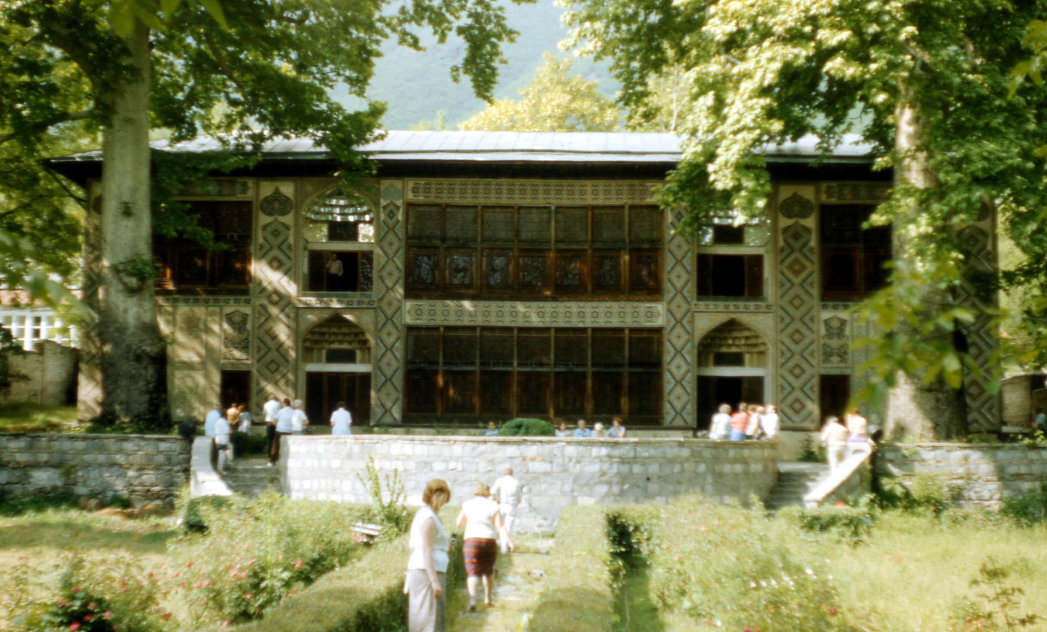 Aserbaidschan 1987